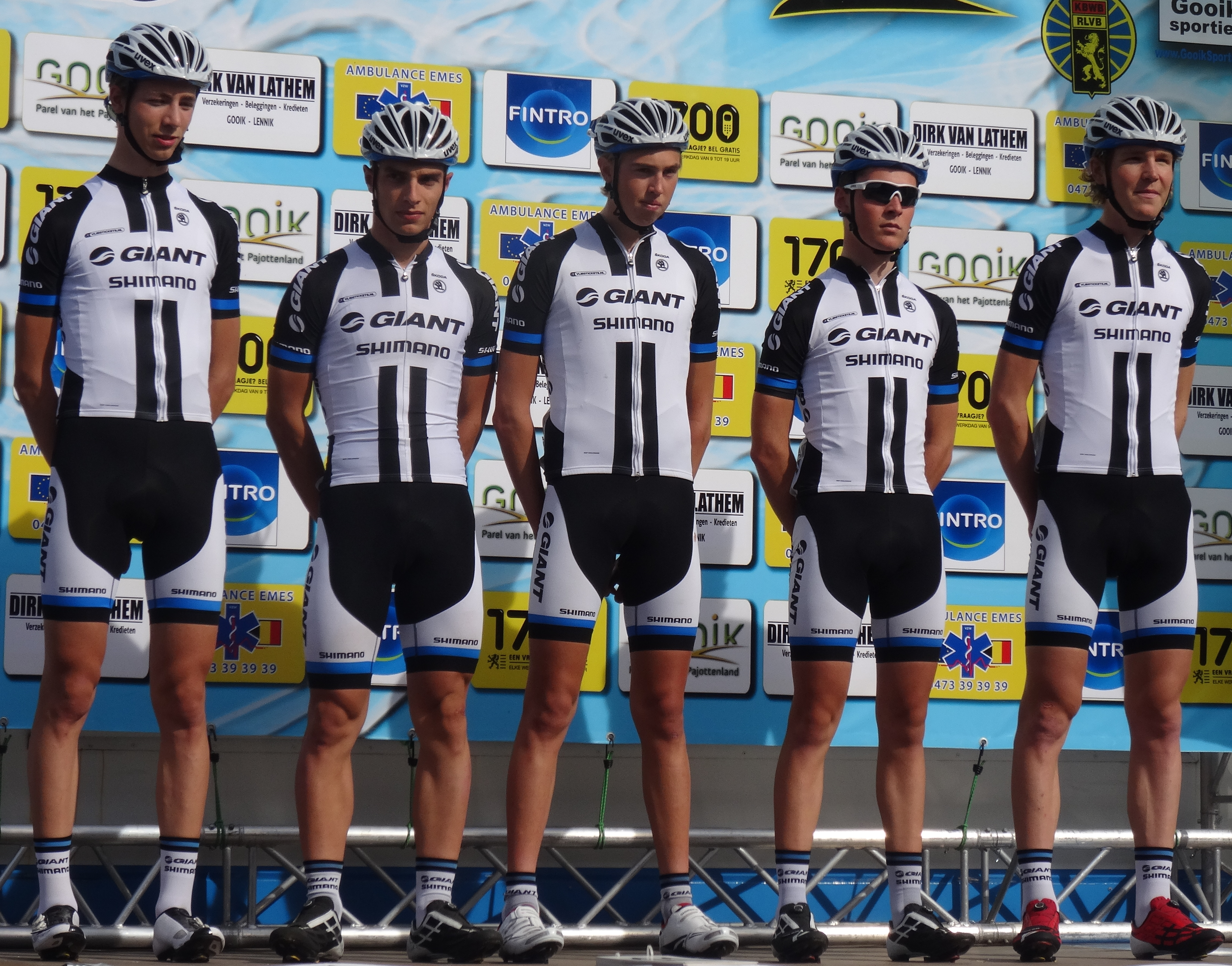 Reportage réalisé le dimanche 28 septembre à l'occasion du départ et de l'arrivée de la Gooikse Pijl 2014 à Gooik, Belgique.